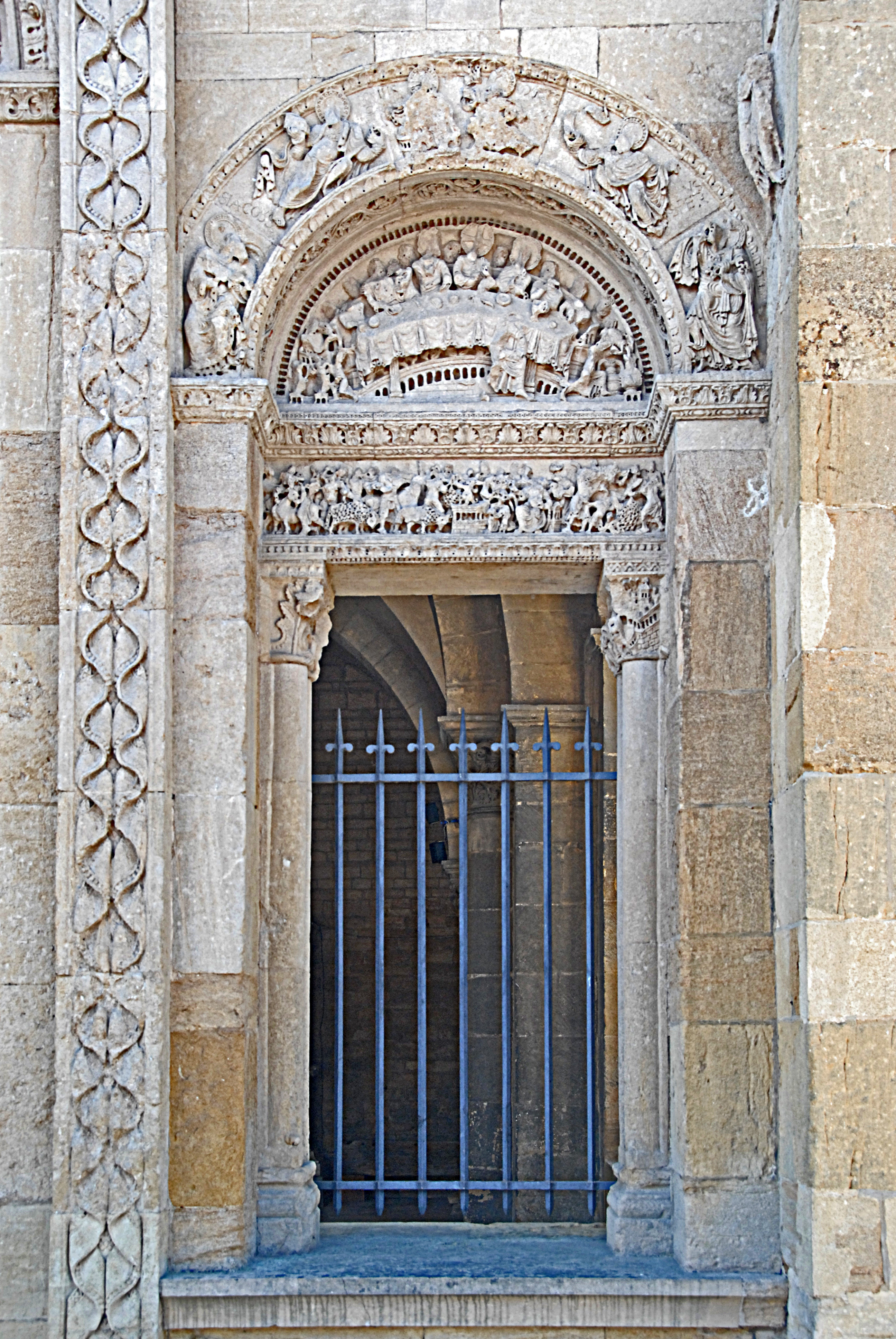 Kleines Nordportal